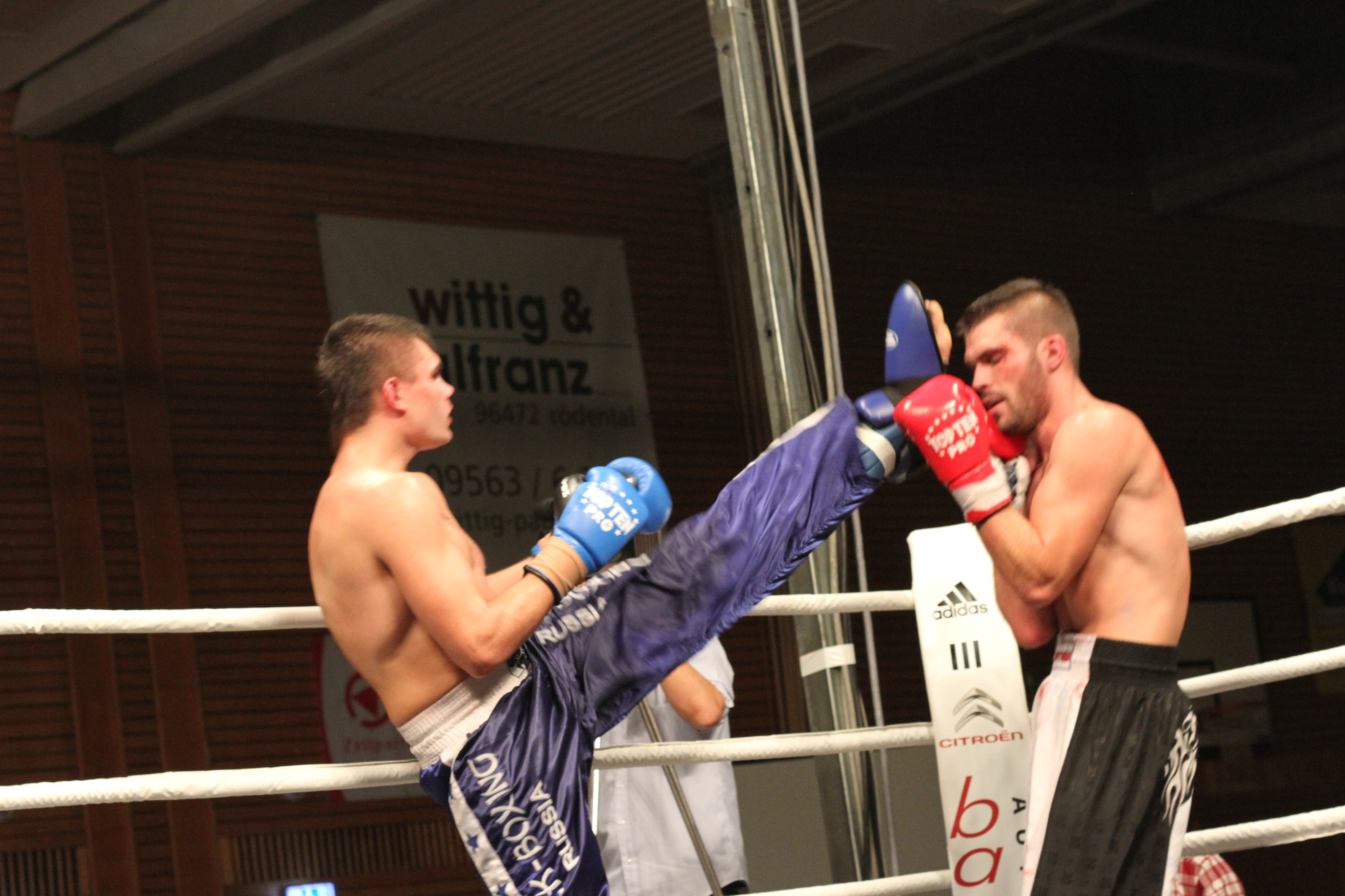 Axe-Kick